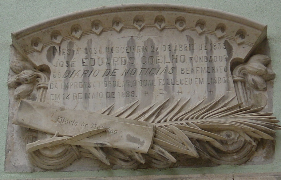 Placa colocada na casa onde nasceu Eduardo Coelho, fundador do jornal diário português Diário de Notícias